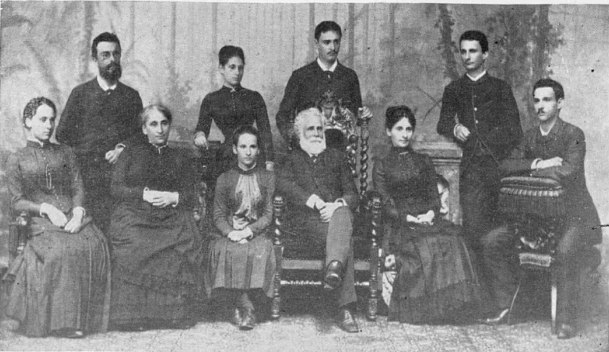 Familia Brătianu (România) la 1885